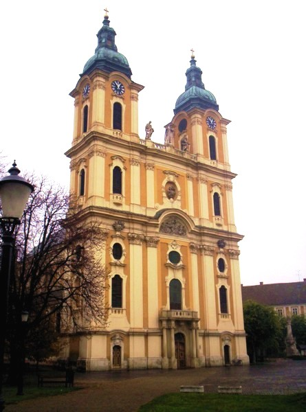 Kalocsa dom